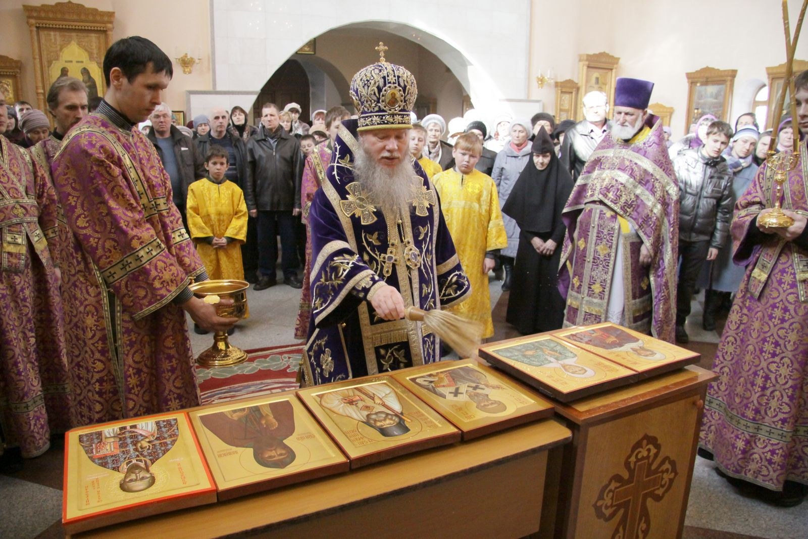 Архиепископ Иосиф освещает новые иконы для храма